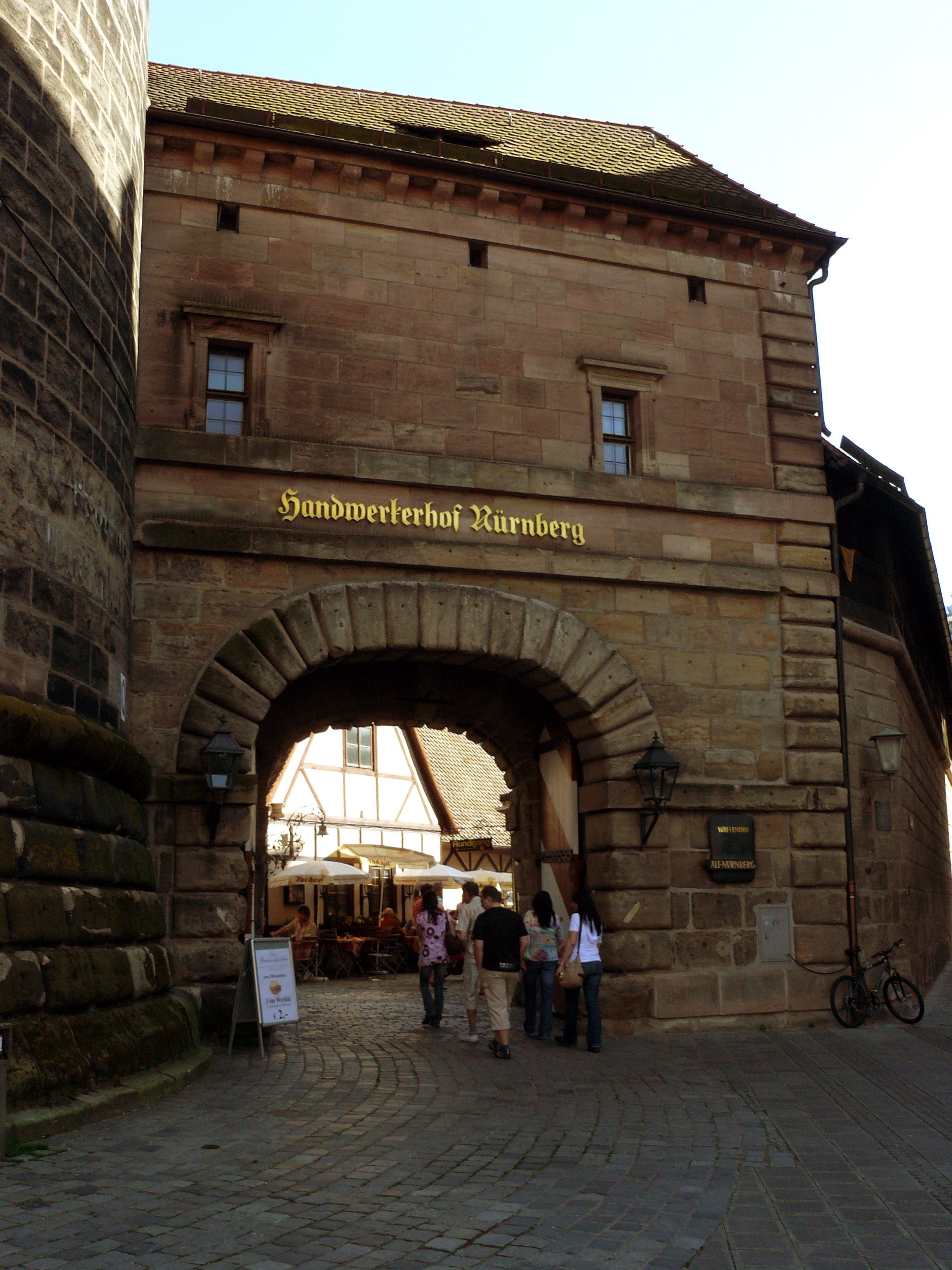 Handwerkerhof Nürnberg Eingang am Königstor